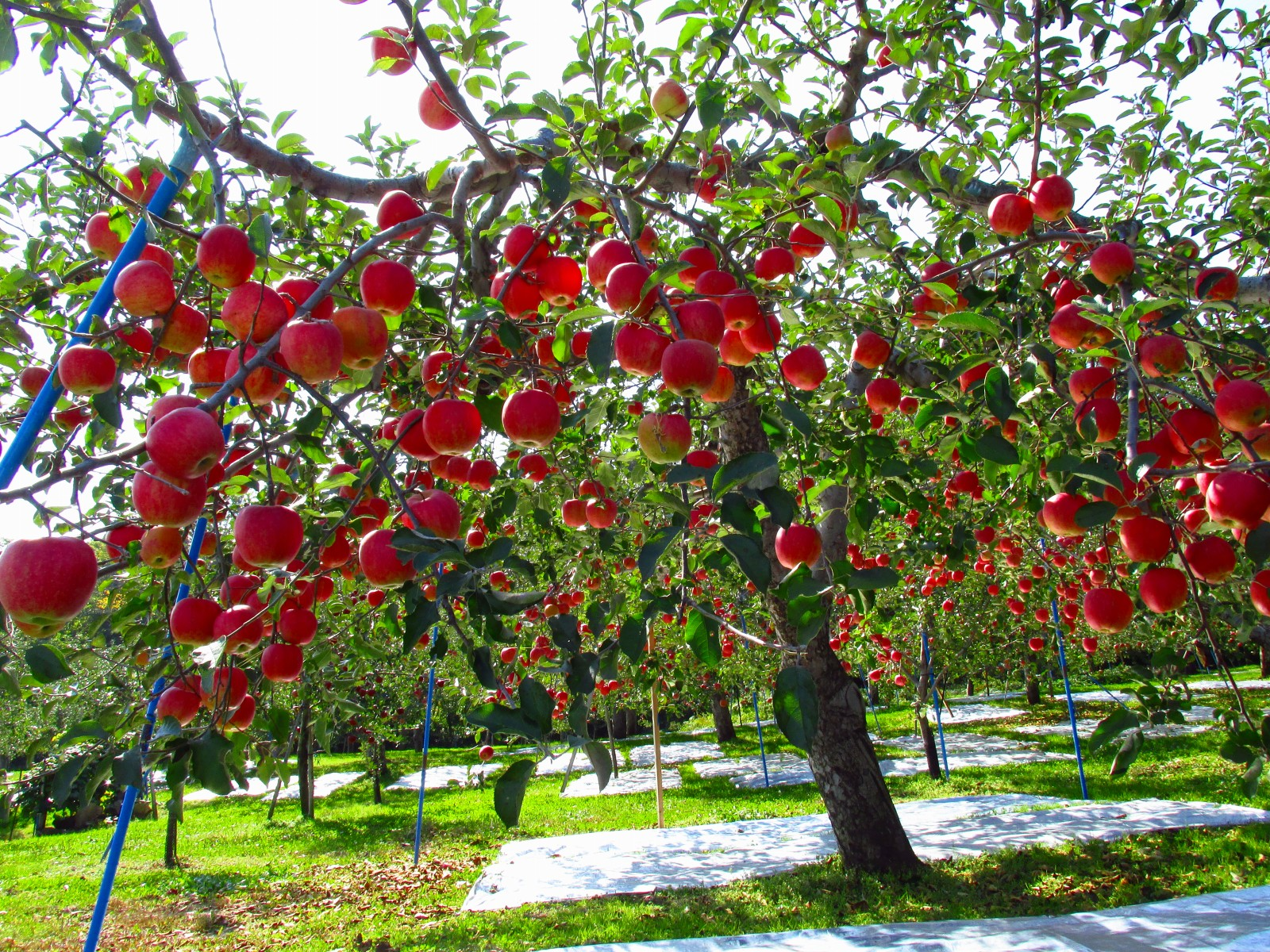 日本国 青森県 弘前市 岩木 フジ。袋掛けし、出荷前に袋を取って色付けする。地面に反射シートを敷き、満遍なく日光に当てることで色が鮮やかになる。袋掛けをしないサンフジは色がやや濃い目だが、フジ（袋掛けあり）は色が美しく、贈答用として一般的。サンフジほど糖度は高くはないが、日持ちはサンフジよりもフジの方が良い。市場に一般的に出回る主力品種はこのフジ。